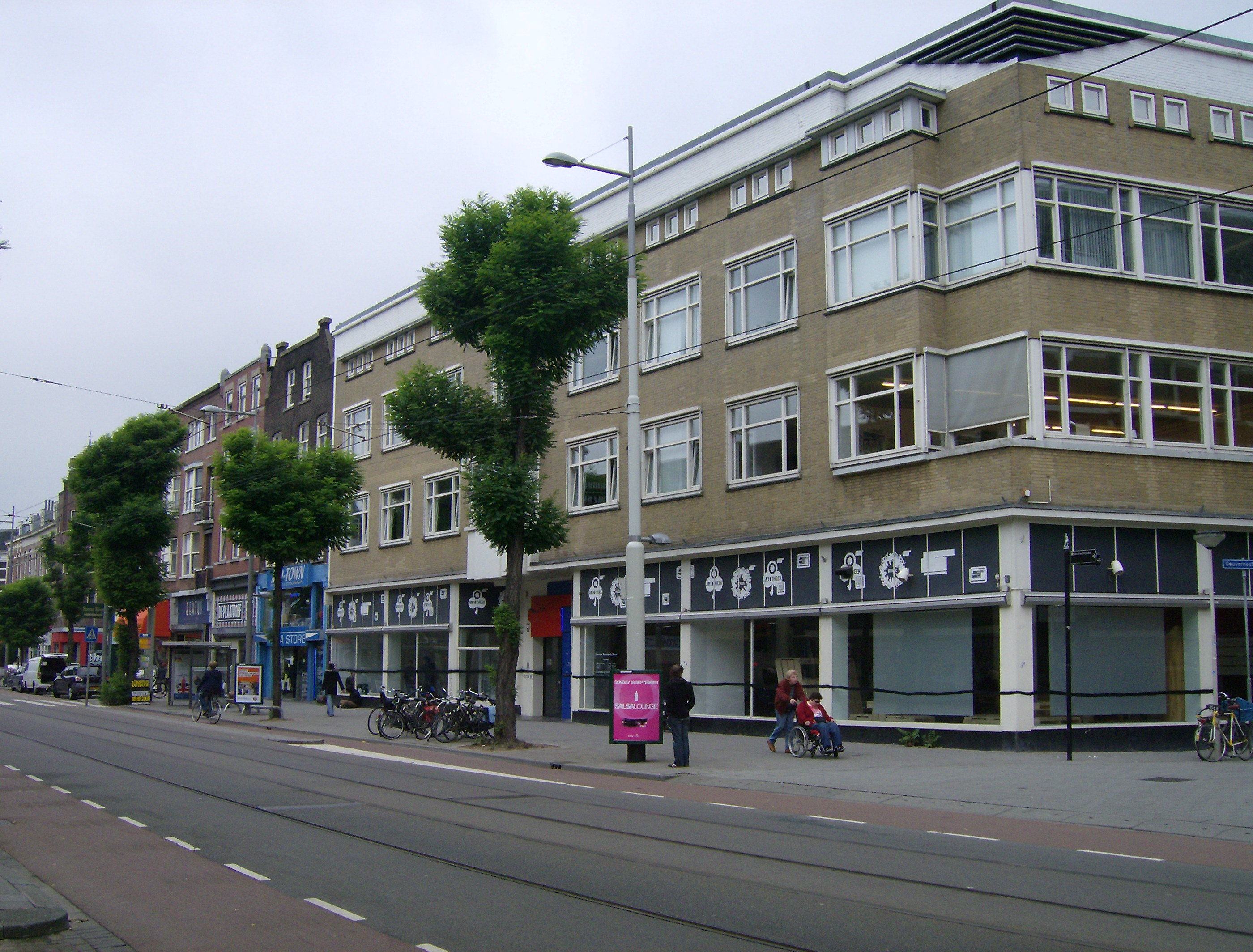 Centrum Beeldende Kunst aan de Nieuwe Binnenweg te Rotterdam. Hier zat vroeger een auto showroom.